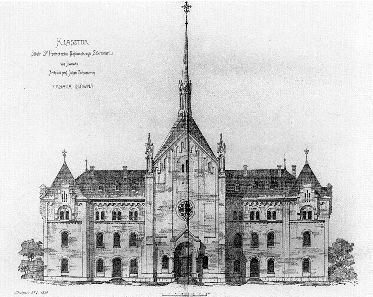 Проект францисканського монастиря на вулиці Лисенка у Львові. Архітектор Юліан Захаревич.